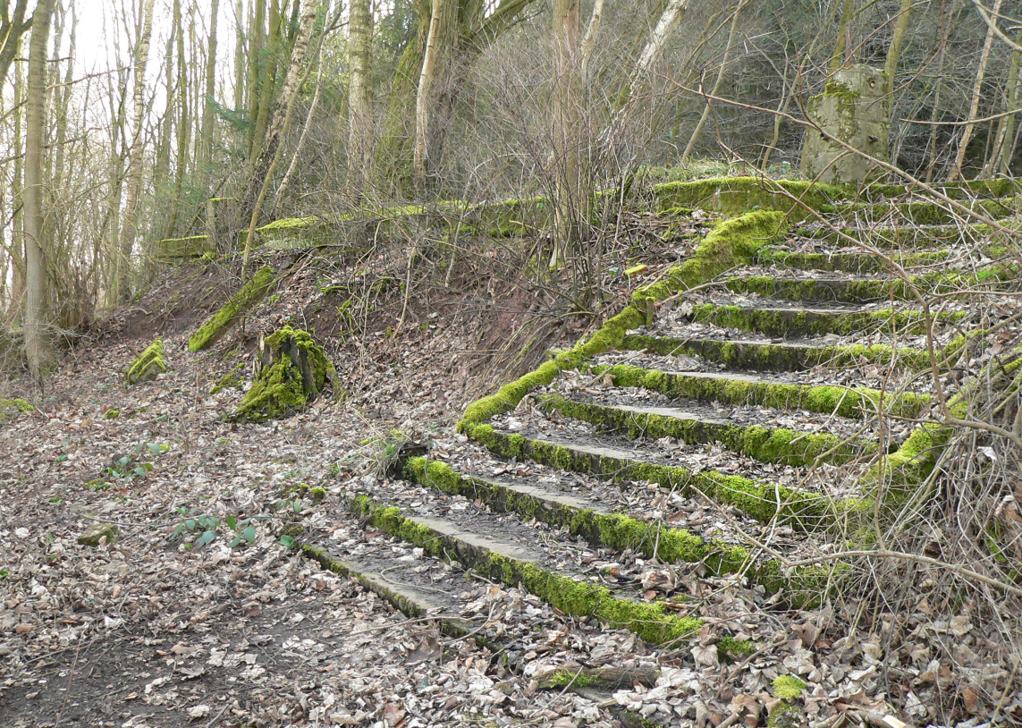 Marienberg Nordstemmen, Reste der Waldgaststätte Alves auf dem Marienberg